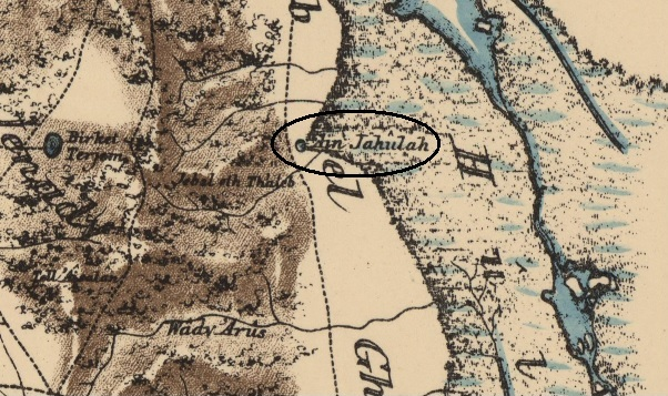 מיקום האתר במפת הסקר ארץ- ישראל המערבית